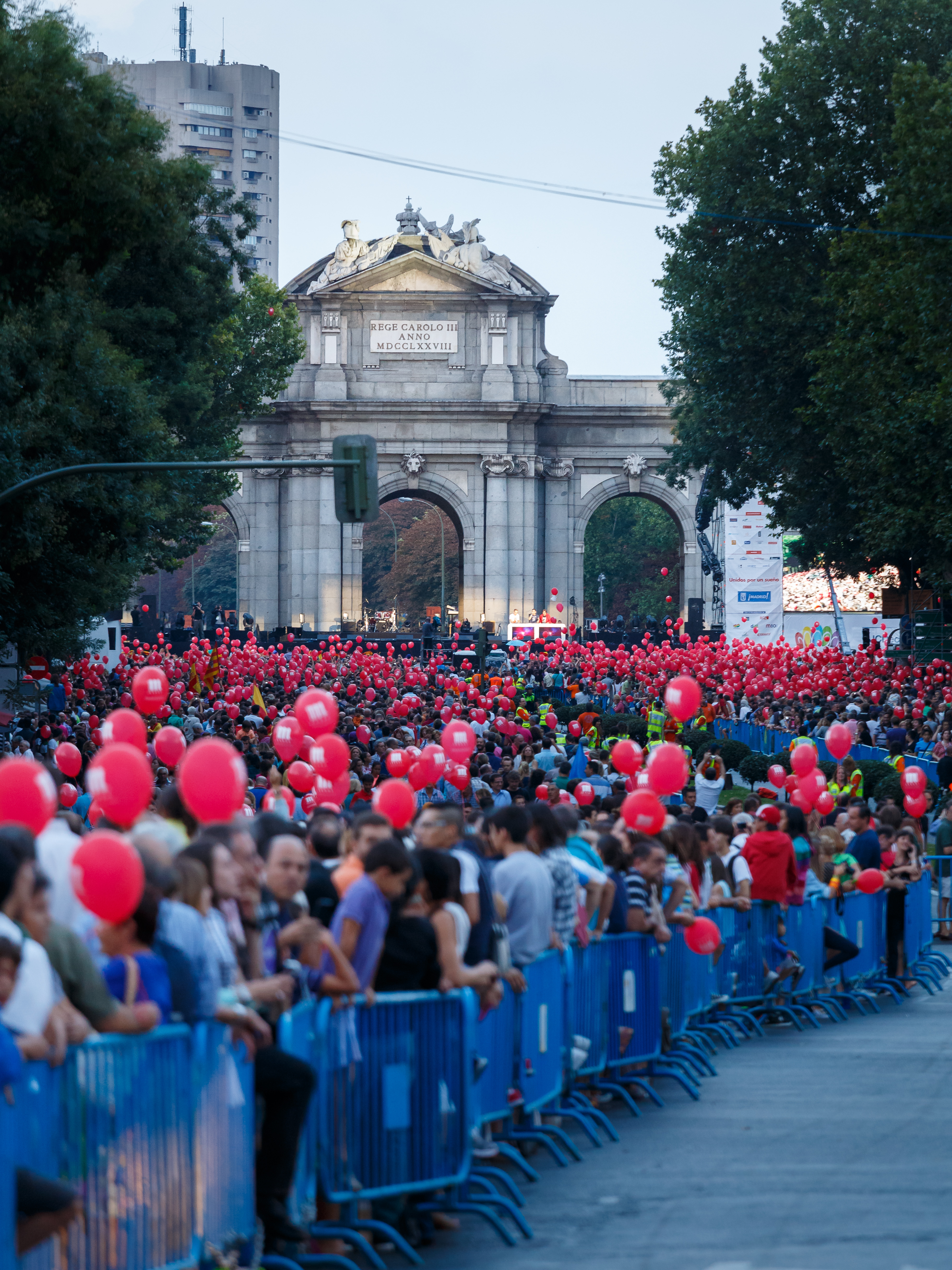 Asistencia de personas entre Cibeles y Puerta de Alcalá para ver la ceremonia de elección de la sede de los juegos olímpicos de 2020. Madrid.